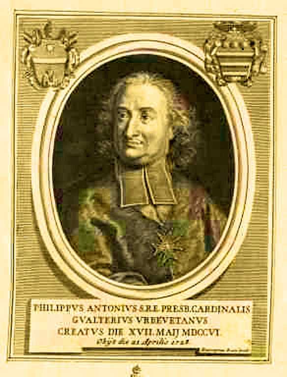 Cardinal Filippo Antonio Gualterio (1660-1728)